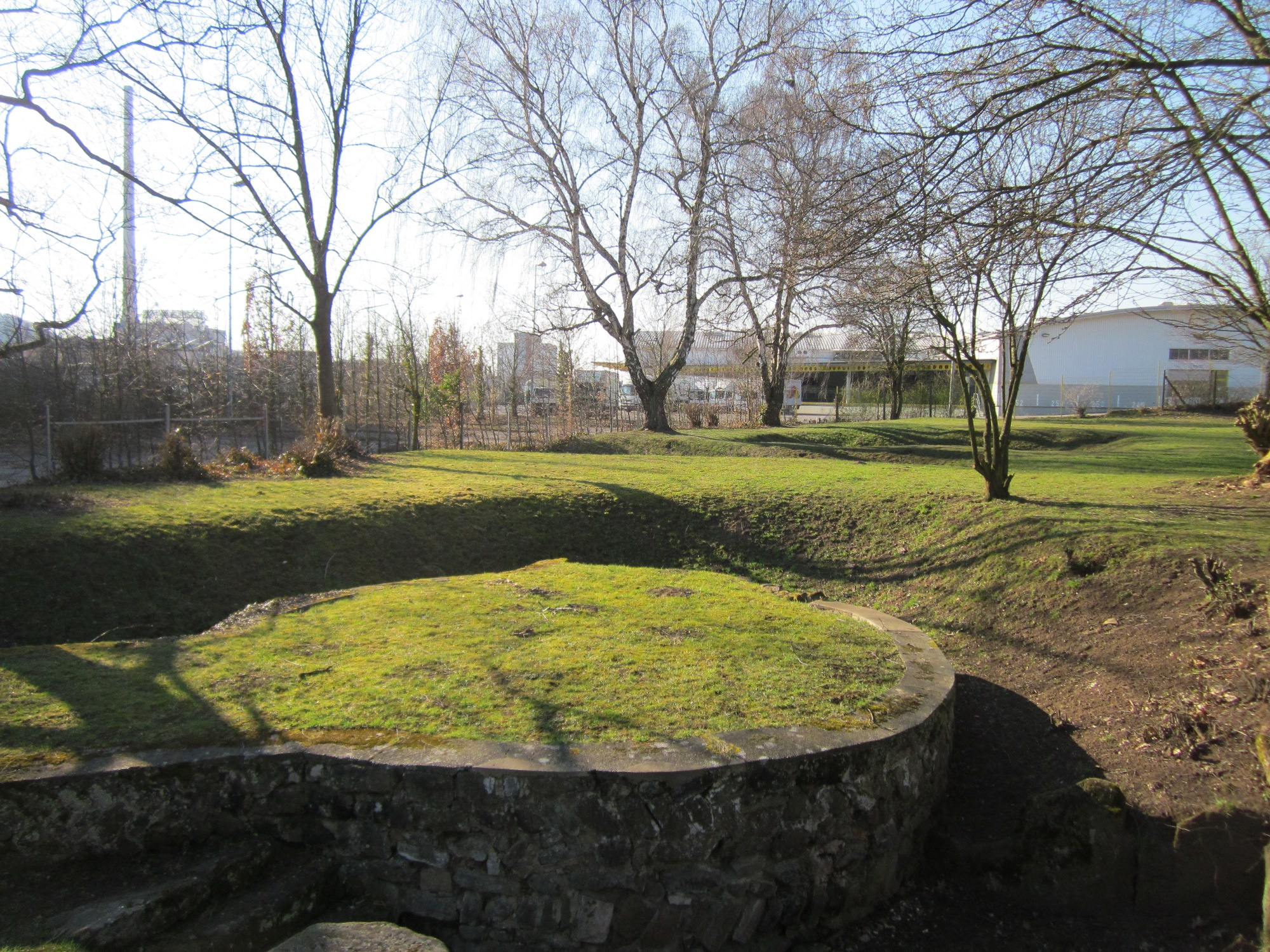 Römerkastell Saarbrücken